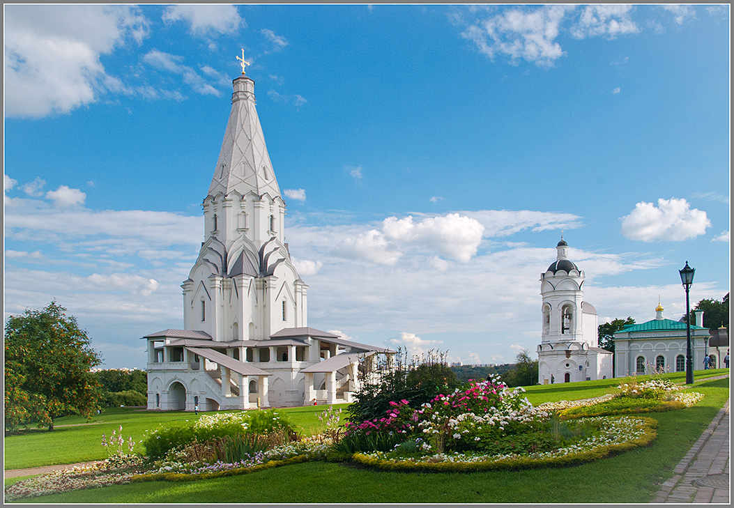 Церковь Вознесения Господня в Коломенском (Москва и Московская область, Москва, Андропова проспект, 39, строение 1)